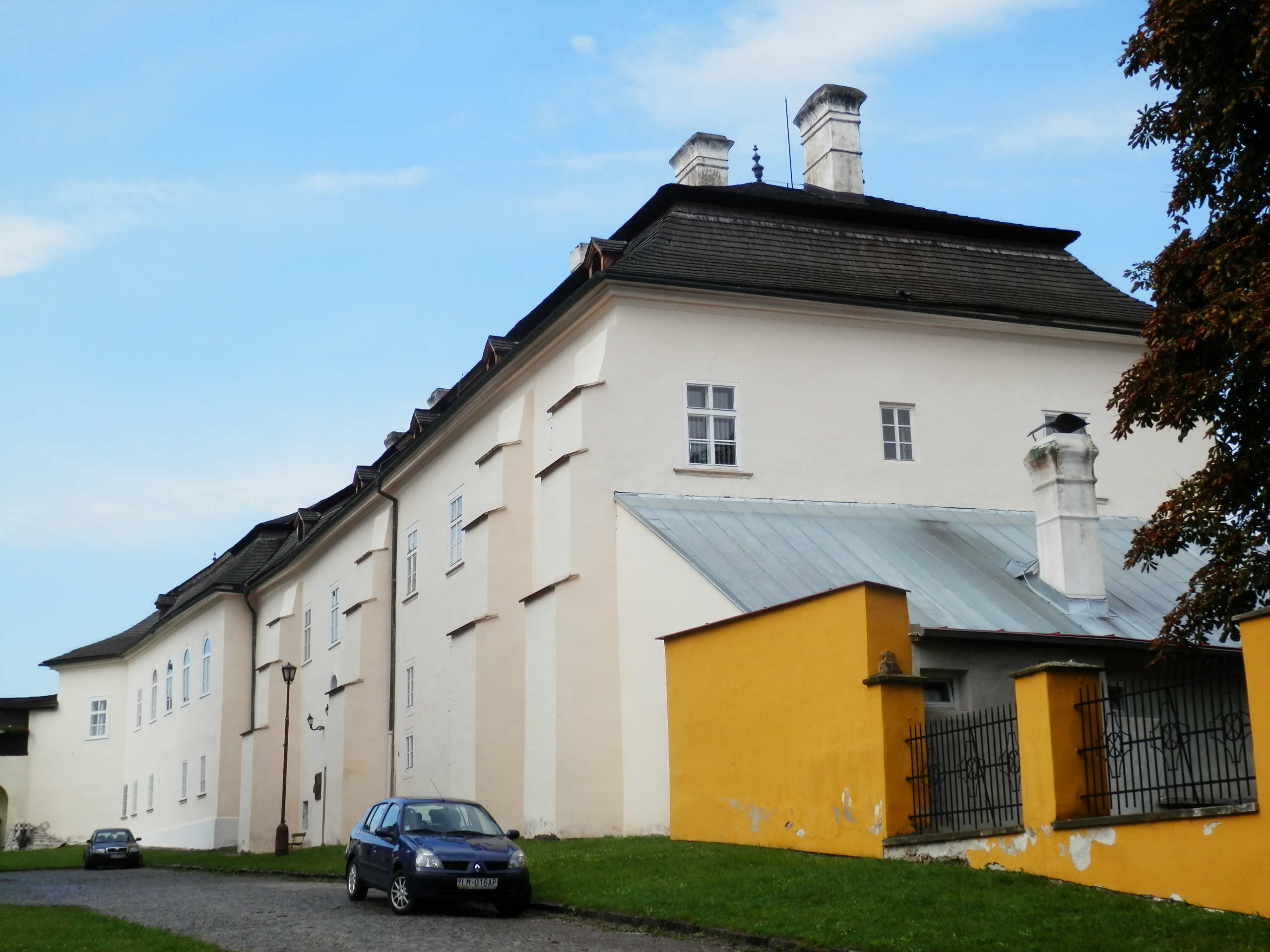 Neskororenesančný biskupský palác z roku 1652 s barokovou úpravou. Spišská Kapitula-Spišské Podhradie.